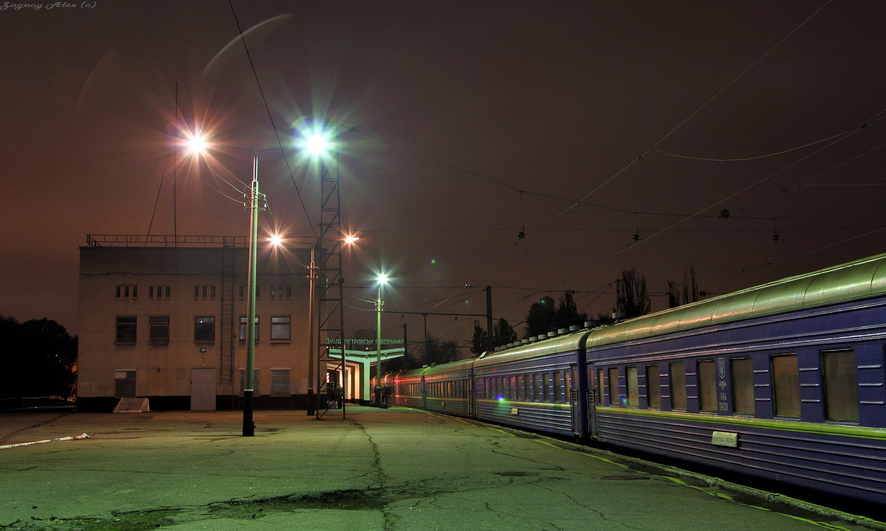 Залізнична станція Дніпропетровськ-Південний